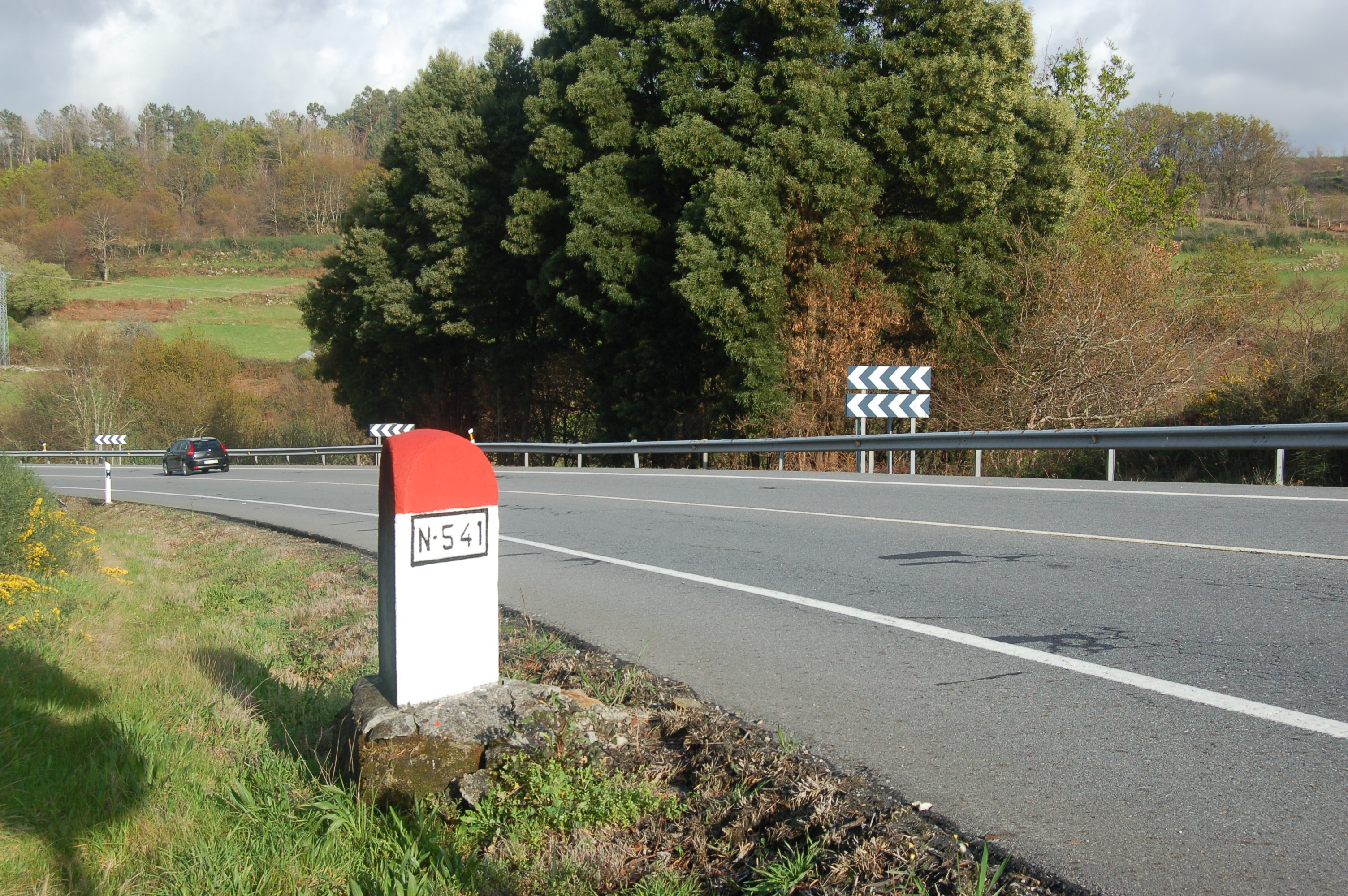 Fito quilométrico nº 76 na estrada N-541 ao seu paso por Sacos (Cerdedo-Cotobade)